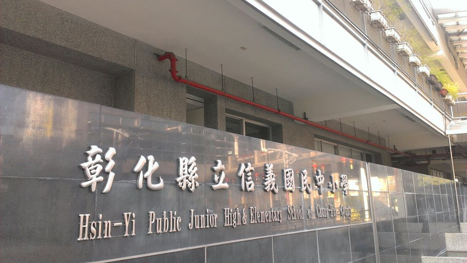 信義國中小字樣